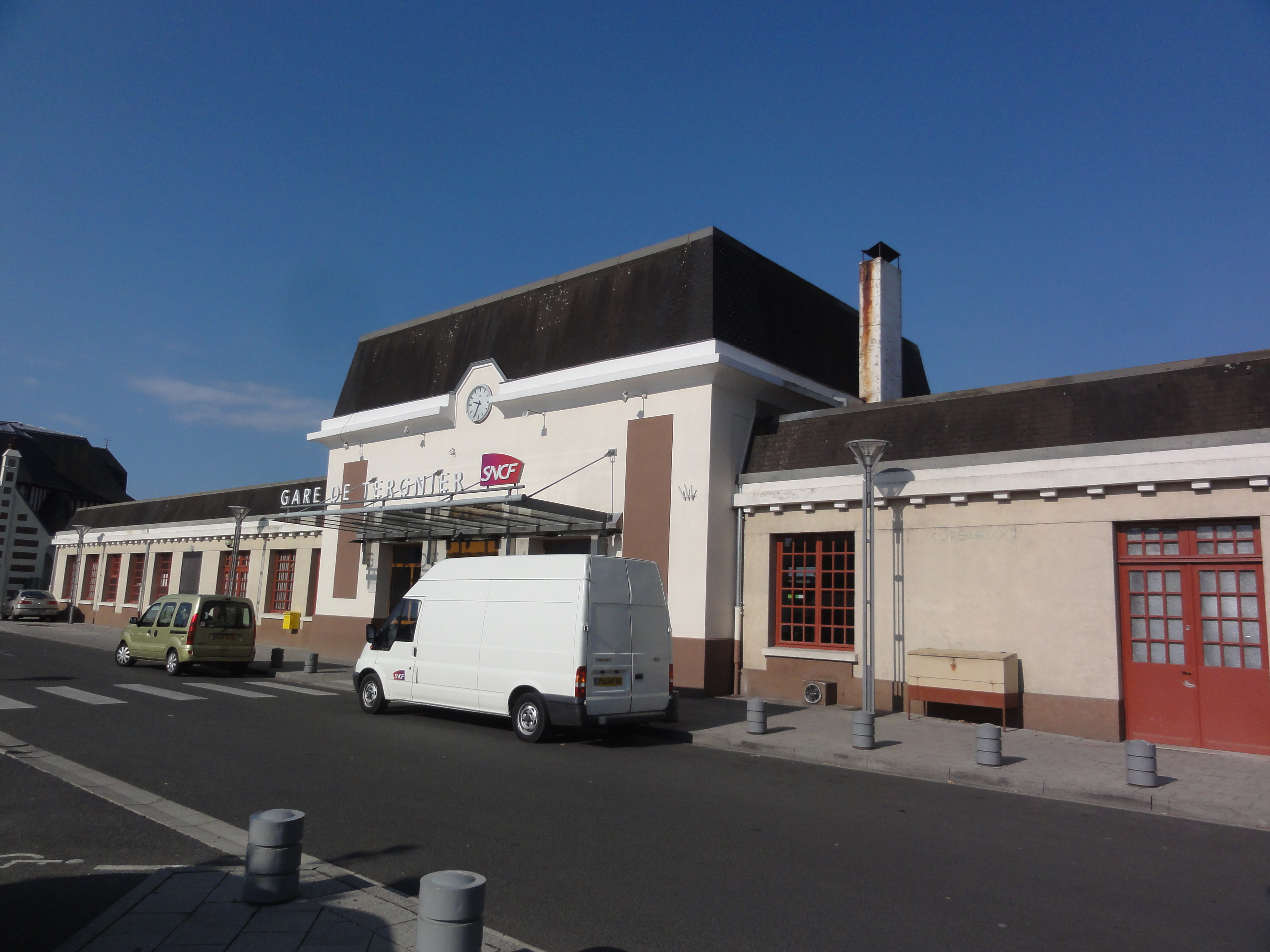 Tergnier (Aisne) gare SNCF